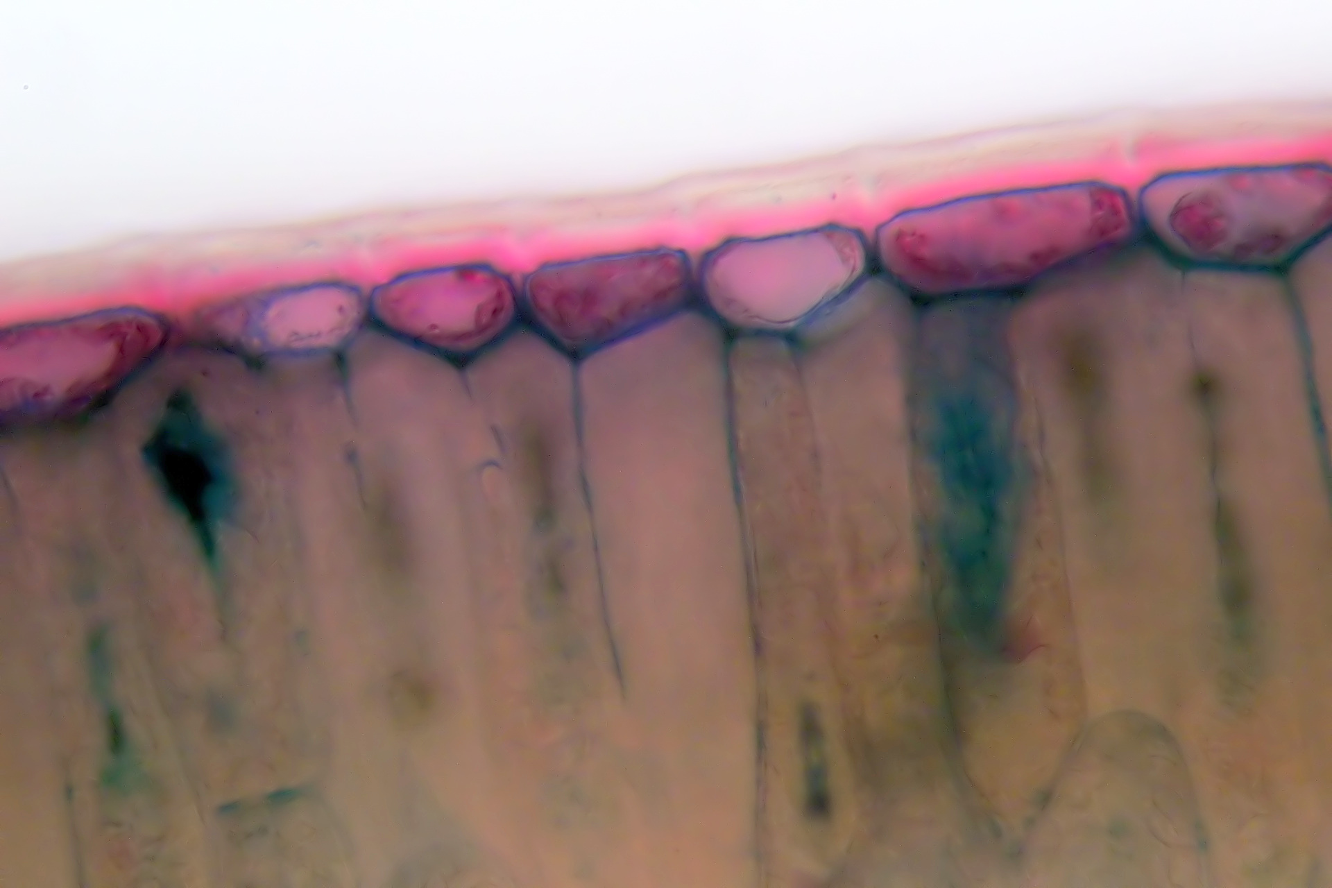 Taxus, leaf, Etzold green.